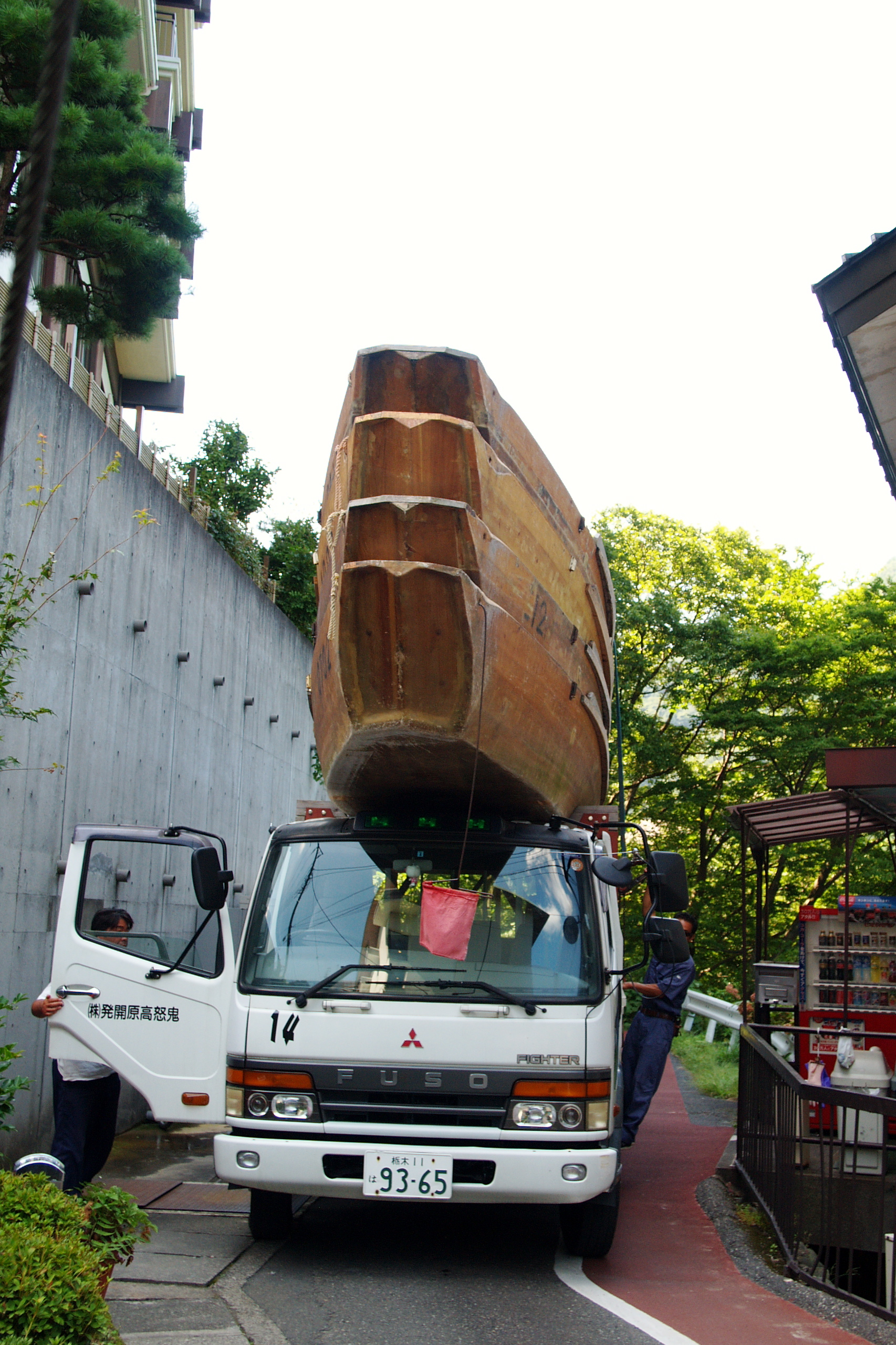 下った後、船を車で運ぶ